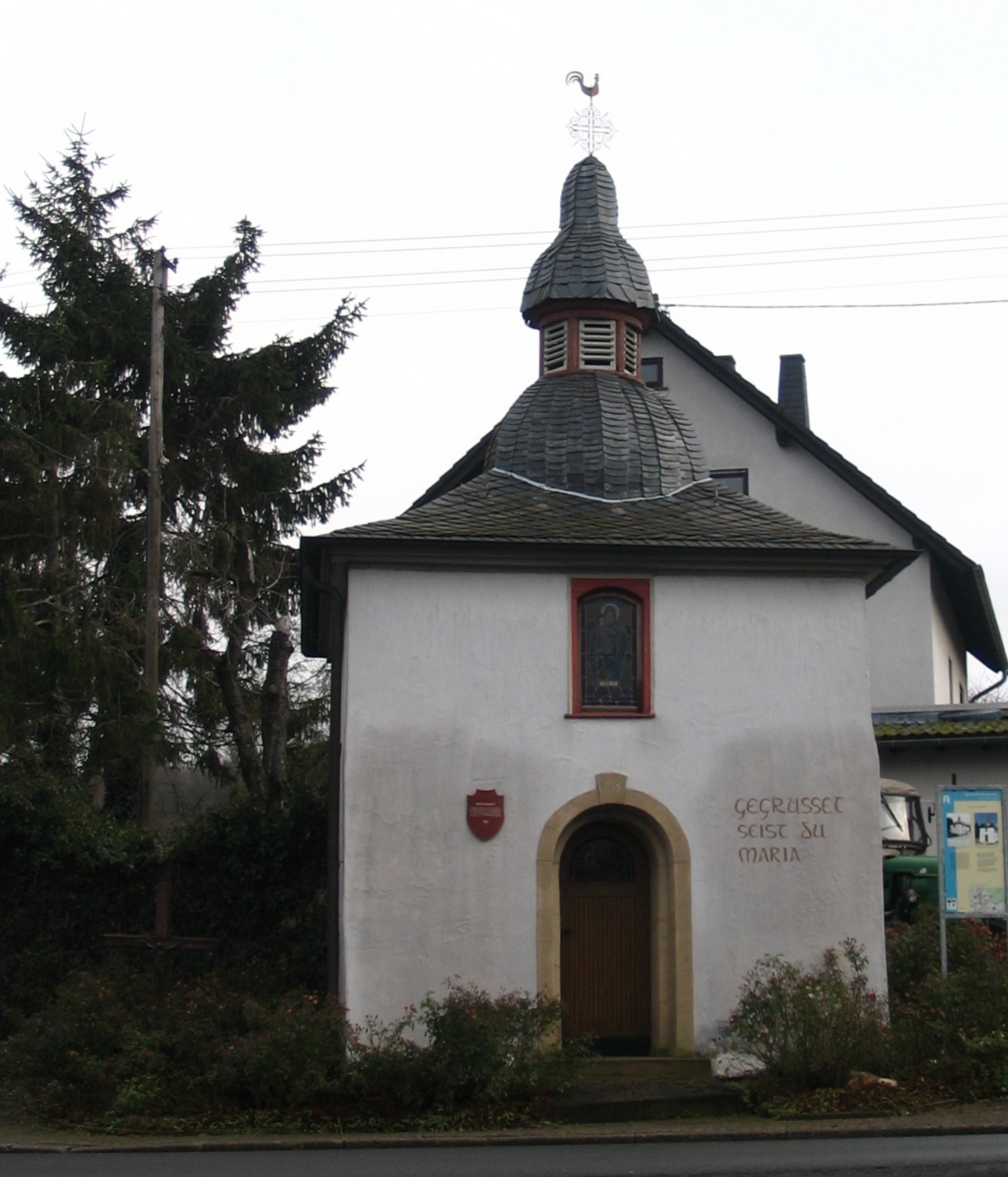 Kapelle Bruschied, Hunsrück